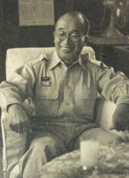 大森寛